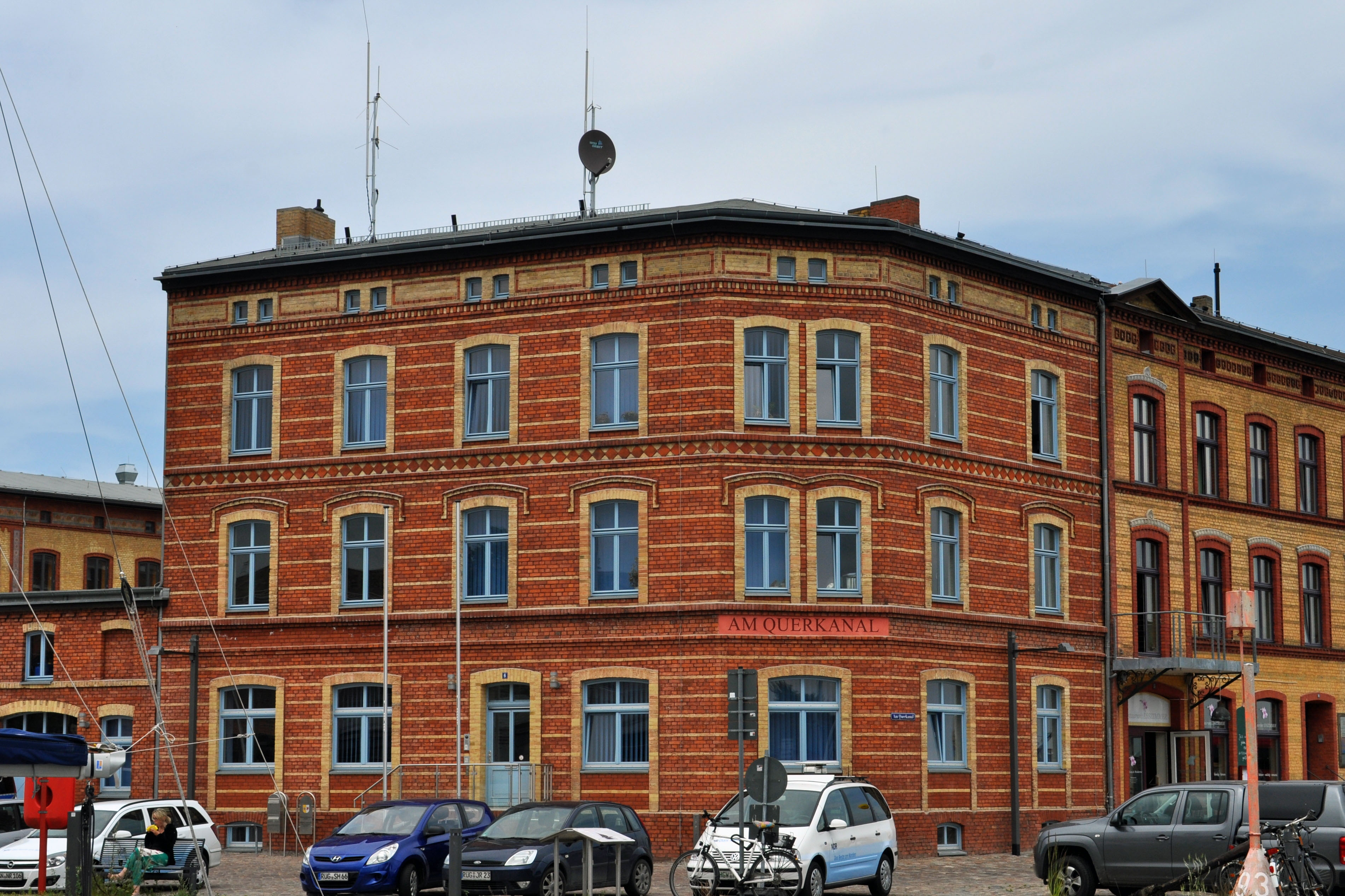 Im Tierpark Stralsund (see Tierpark Stralsund.